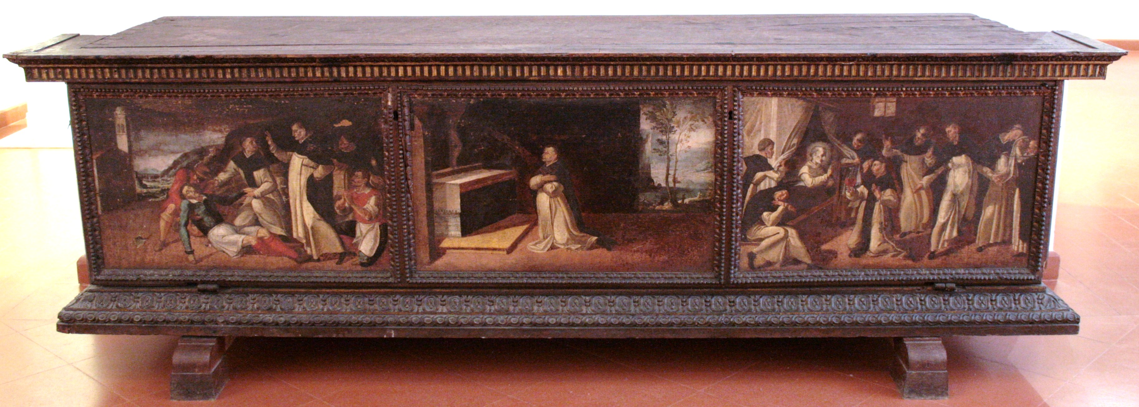 Cassa funebre del Beato Giacomo Bianconi di Bevagna dipinta con te dei suoi miracoli da Ascensidonio Spacca detto il Fantino e conservata nel Museo di Bevagna